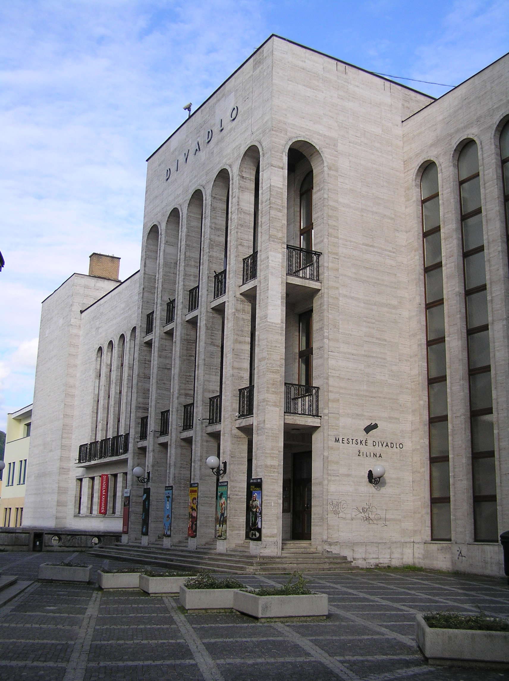 Žilina, divadlo